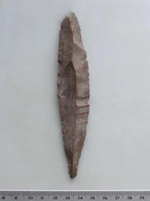 Amuq-Spitze aus der spätneolithischen Siedlung von Shir